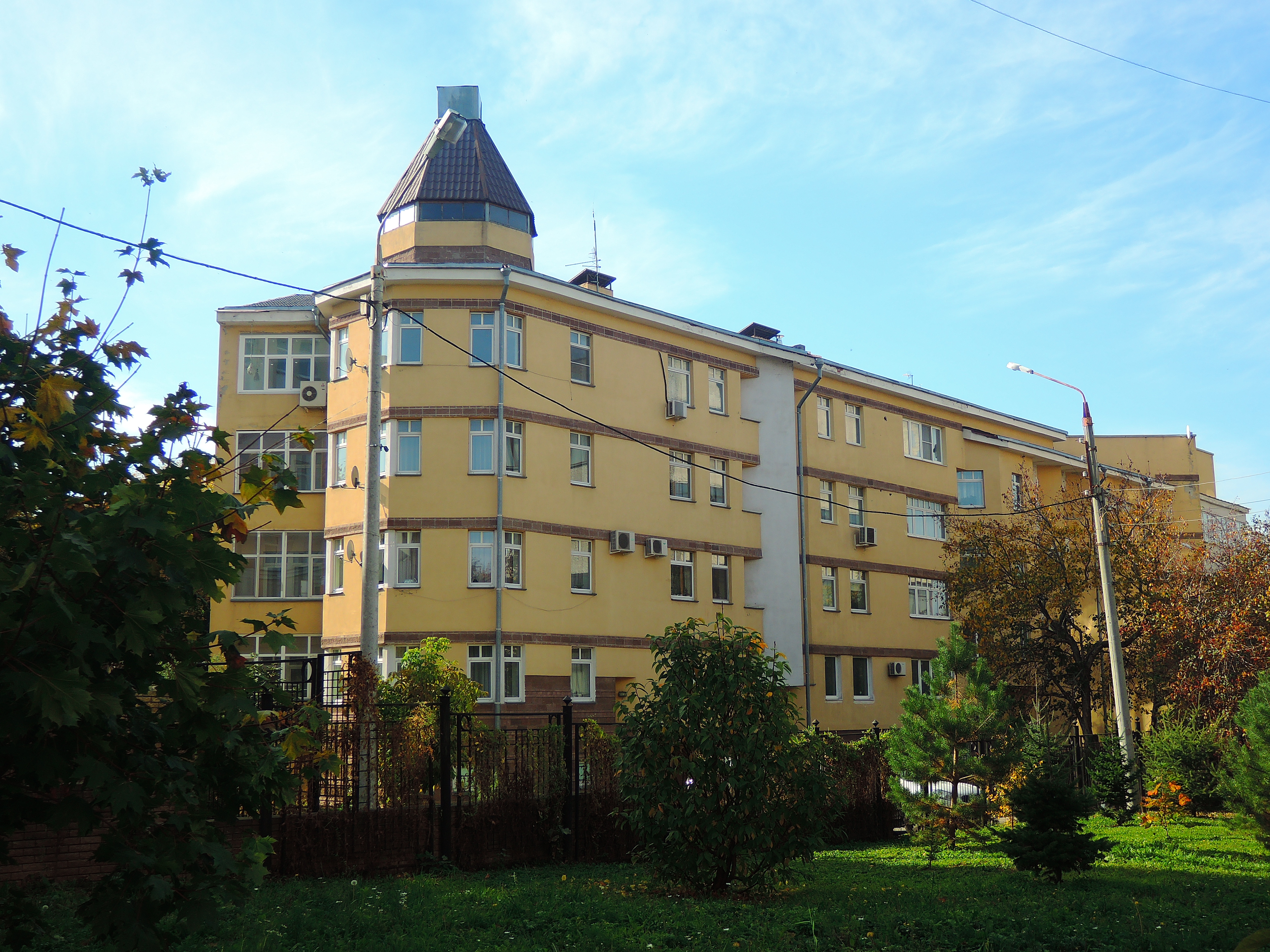 Особняк: переулок Гоголя, 5, Нижний Новгород, Нижегородская область